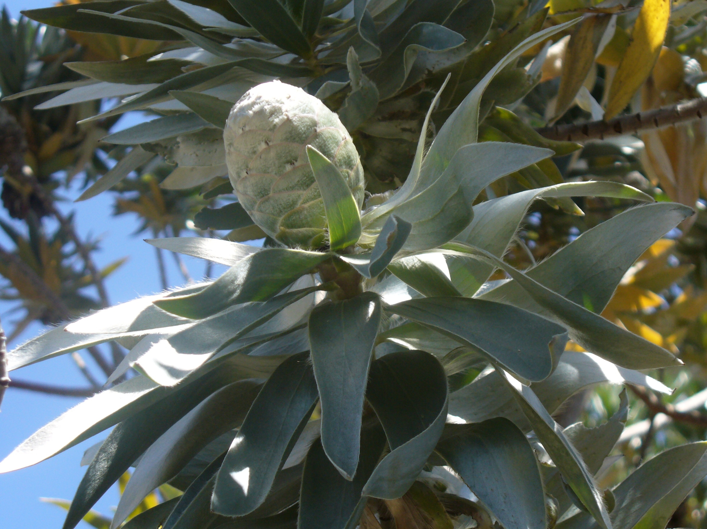 Female cone silver tree